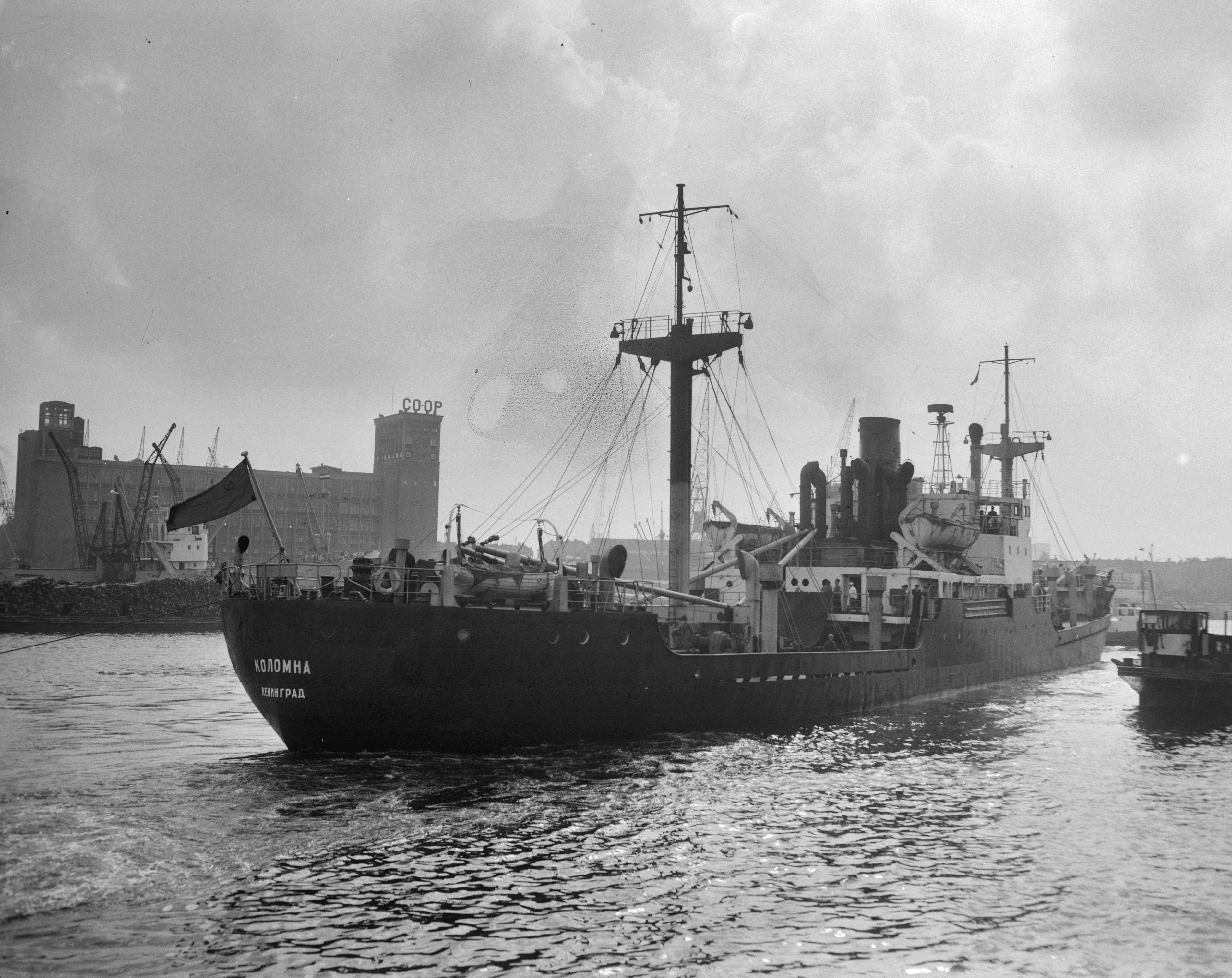 Collectie / Archief : Fotocollectie Anefo Reportage / Serie : [ onbekend ] Beschrijving : Russisch Ms. Kolomna meert na aanvaring met de Grumo in Rotterdam Datum : 27 september 1956 Locatie : Rotterdam, Rusland Trefwoorden : aanvaringen Fotograaf : Pot, Harry / Anefo Auteursrechthebbende : Nationaal Archief Materiaalsoort : Negatief (zwart/wit) Nummer archiefinventaris : bekijk toegang 2.24.01.04 Bestanddeelnummer : 908-0297